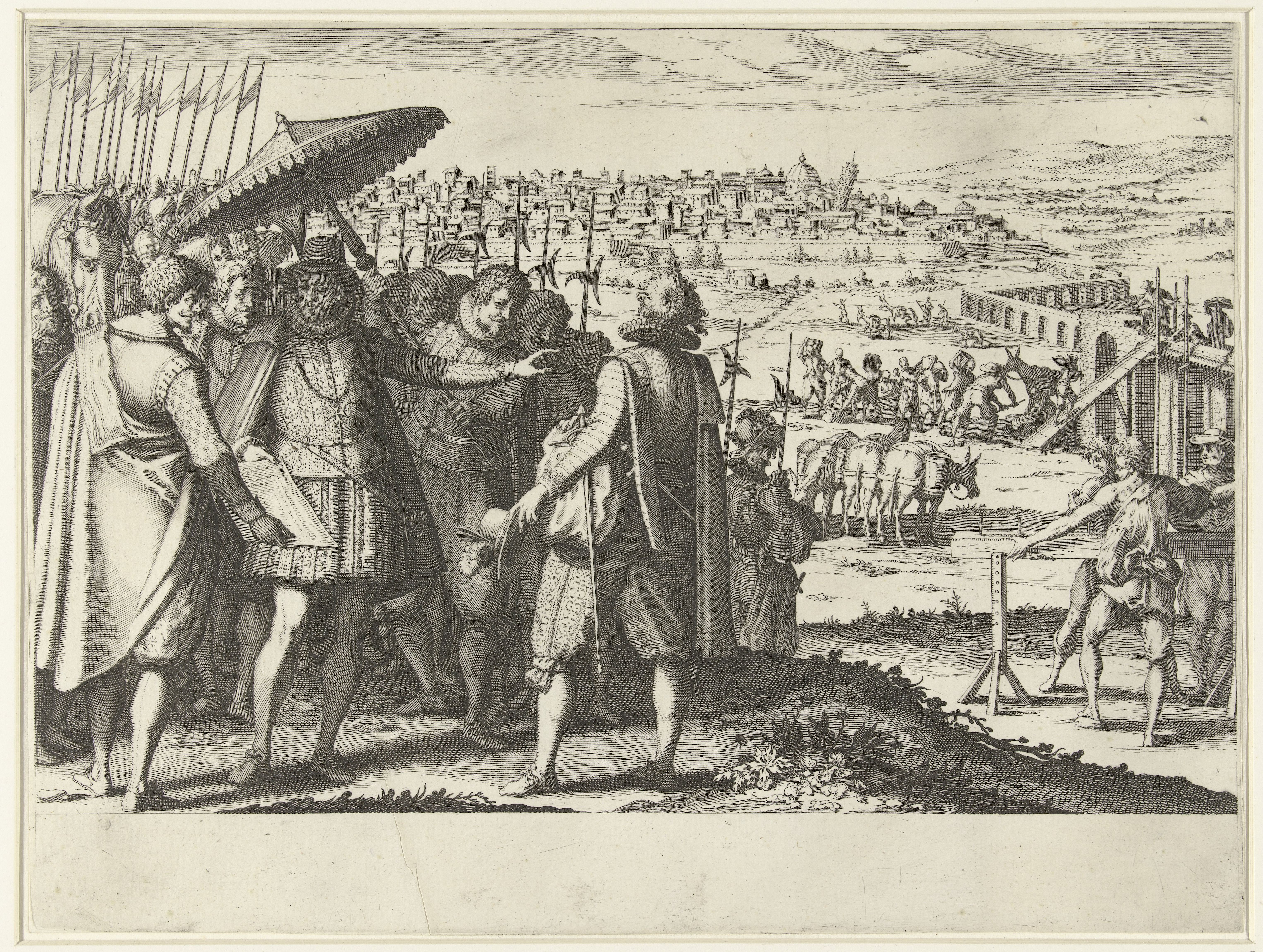 IdentificatieTitel(s): Ferdinando I de' Medici laat het aquaduct bij Pisa reparerenLeven van Ferdinando I de' Medici (serietitel)Objecttype: prent Objectnummer: RP-P-OB-20.628Catalogusreferentie: Meaume 538Lieure 151-1(2)Opschriften / Merken: verzamelaarsmerk, verso linksonder, gestempeld: Lugt 240Omschrijving: Ferdinando I de' Medici staat links onder een parasol en wijst naar een aquaduct, rechts op het middenplan, Waar: werklui aan bouwen. Op de achtergrond de stad Pisa met de typerende scheve toren. Onder de voorstelling een lege marge. Deze prent is onderdeel van een serie van 16 prenten (plus 2 onvoltooide prenten) van het leven van Ferdinando I de' Medici, bedoeld geweest als aanvulling op een reeds bestaande reeks illustraties van de geschiedenis van de Medicis.VervaardigingVervaardiger: prentmaker: Jacques Callotnaar schilderij van: Matteo Rossellidrukker: Jacques CallotPlaats vervaardiging: FlorenceDatering: 1614 - 1620Fysieke kenmerken: gravureMateriaal: papier Techniek: graveren (drukprocedé)Afmetingen: blad: h 225 mm × b 300 mmOnderwerpWat: aqueduct (~ water supply)bouwwerkzaamhedenWaarPisaWie: Ferdinando I de'MediciVerwerving en rechtenVerwerving: overdracht van beheer 1816Copyright: Publiek domein